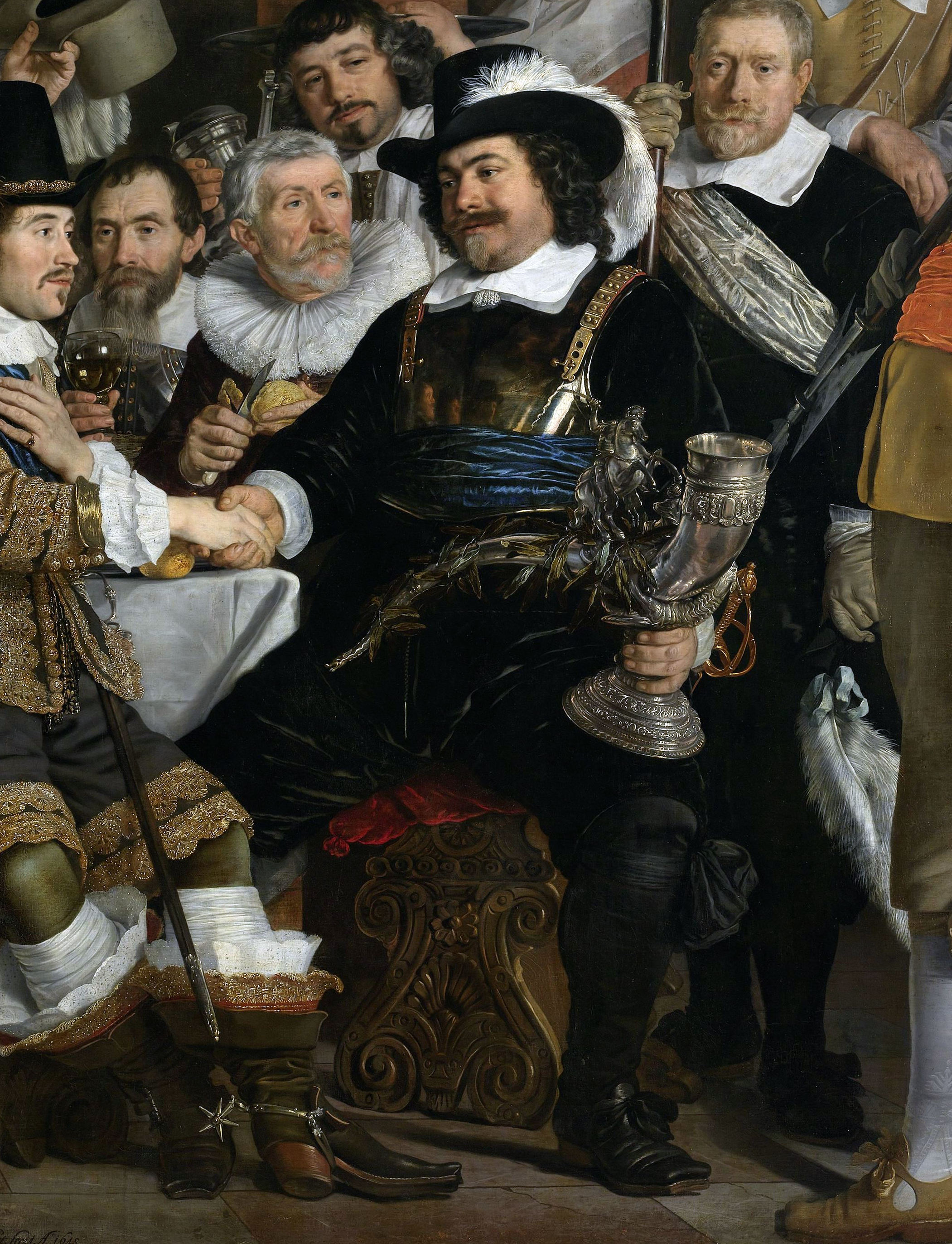 De schuttersmaaltijd in de Voetboogdoelen of St. Jorisdoelen te Amsterdam ter viering van het sluiten van de vrede van Munster, 18 juni 1648. Voorgesteld zijn: kapitein Cornelis Jansz Witsen (met de zilveren drinkhoorn), luitenant Johan Oetgens van Waveren (die zijn hand schudt), de vaandrig Jacob Banningh (zittend naast de grote trommel), Dirck Claesz Thoveling en Thomas Hartog (sergeanten), Pieter van Hoorn, Willem Pietersz van der Voort, Adriaen Dirck Sparwer, Hendrick Calaber, Govert van der Mij, Johannes Calaber, Benedictus Schaeck, Jan Maes, Jacob van Diemen, Jan van Ommeren, Isaac Ooyens, Gerrit Pietersz van Anstenraadt, Herman Teunisz de Kluyter, Andries van Anstenraadt, Christoffel Poock, Hendrick Dommer Wz, Paulus Hennekijn, Lambregt van den Bos en Willem (de trommelslager). Op de grote trommel hangt een papier met een gedicht van Jan Vos. Door de openstaande ramen is de gevel van de brouwerij 'het Lam' aan de Singel zichtbaar. Rechts brengt een vrouwen een kalkoenpastei binnen. Op tafel staan tinnen borden, roemers en andere glazen. Links staat op de vloer een grote metalen koeler met een wijnvat.; Bartholomeus van der Helst (1613–1670), olieverf op doek, 1648